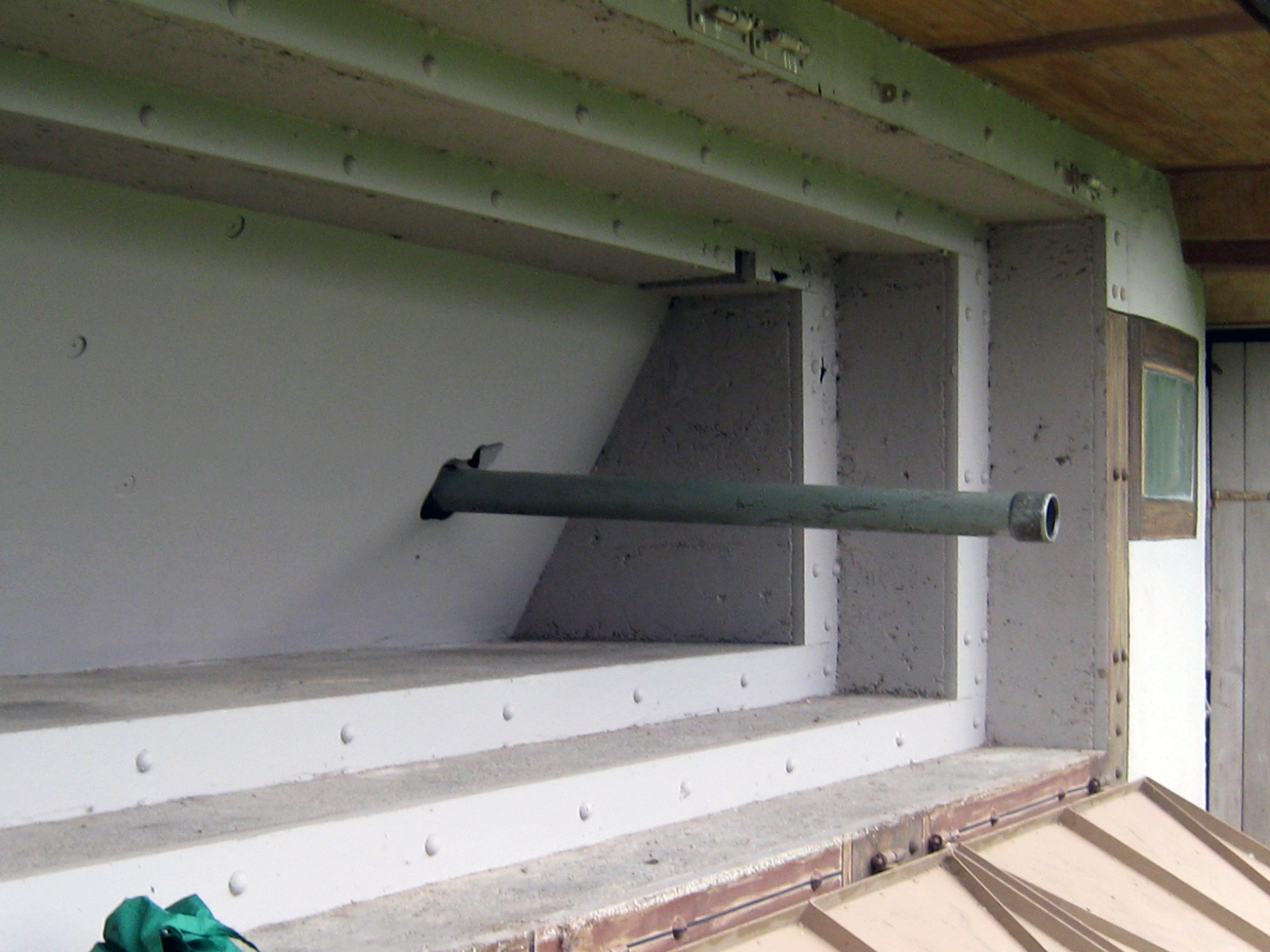 Infanteriewerk A 7838 in Sufers, Kanton Graubünden: Geschütz von aussen